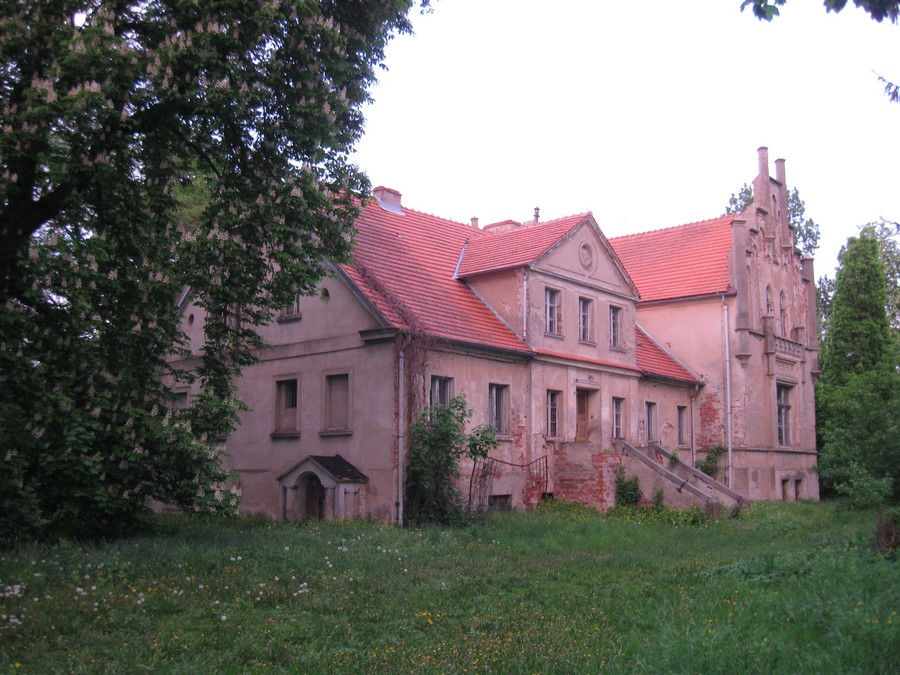 Konarzewo - dwór